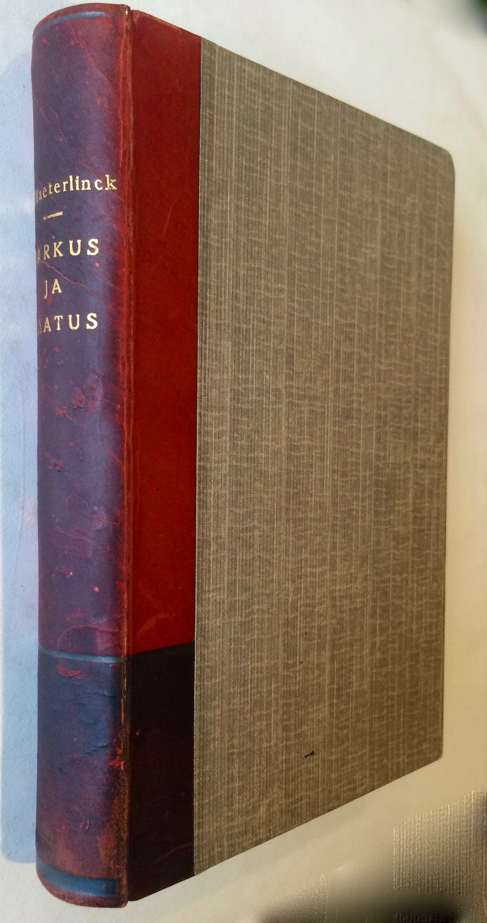 Nobeli laureaatide raamatu Taska poolnahkköide